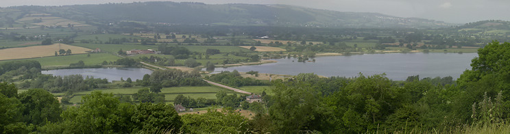 vista del lago Chew Lake